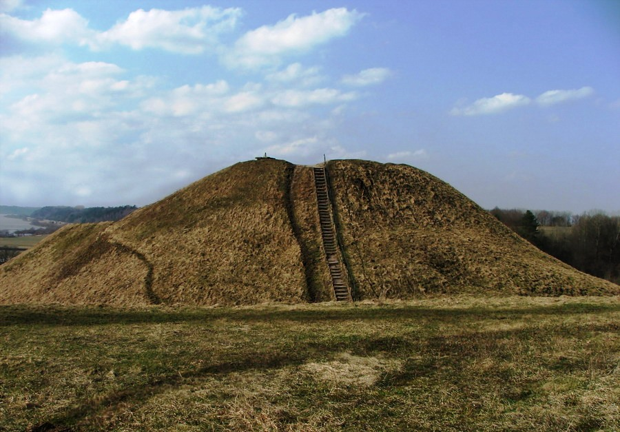 Palemono kalnas